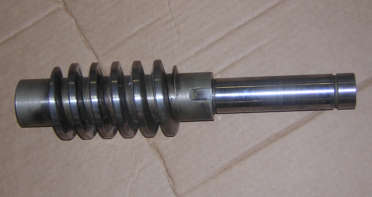 Tornillo sin fin de un montacargas.